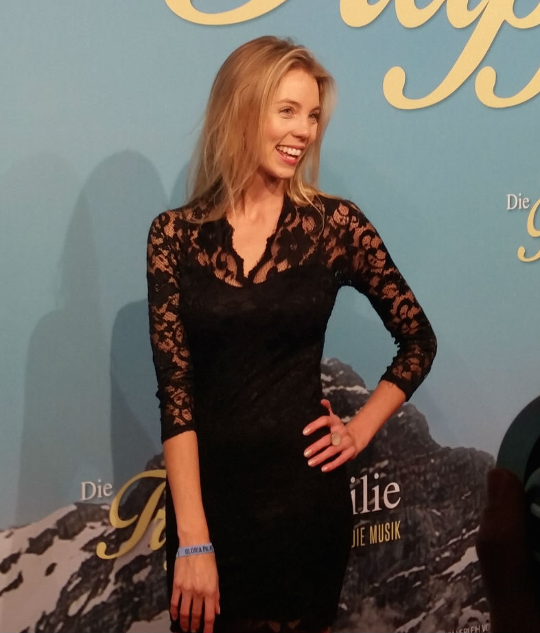 Sina Bianca Hentschel auf der Premiere von "Die Trapp Familie" (2015)